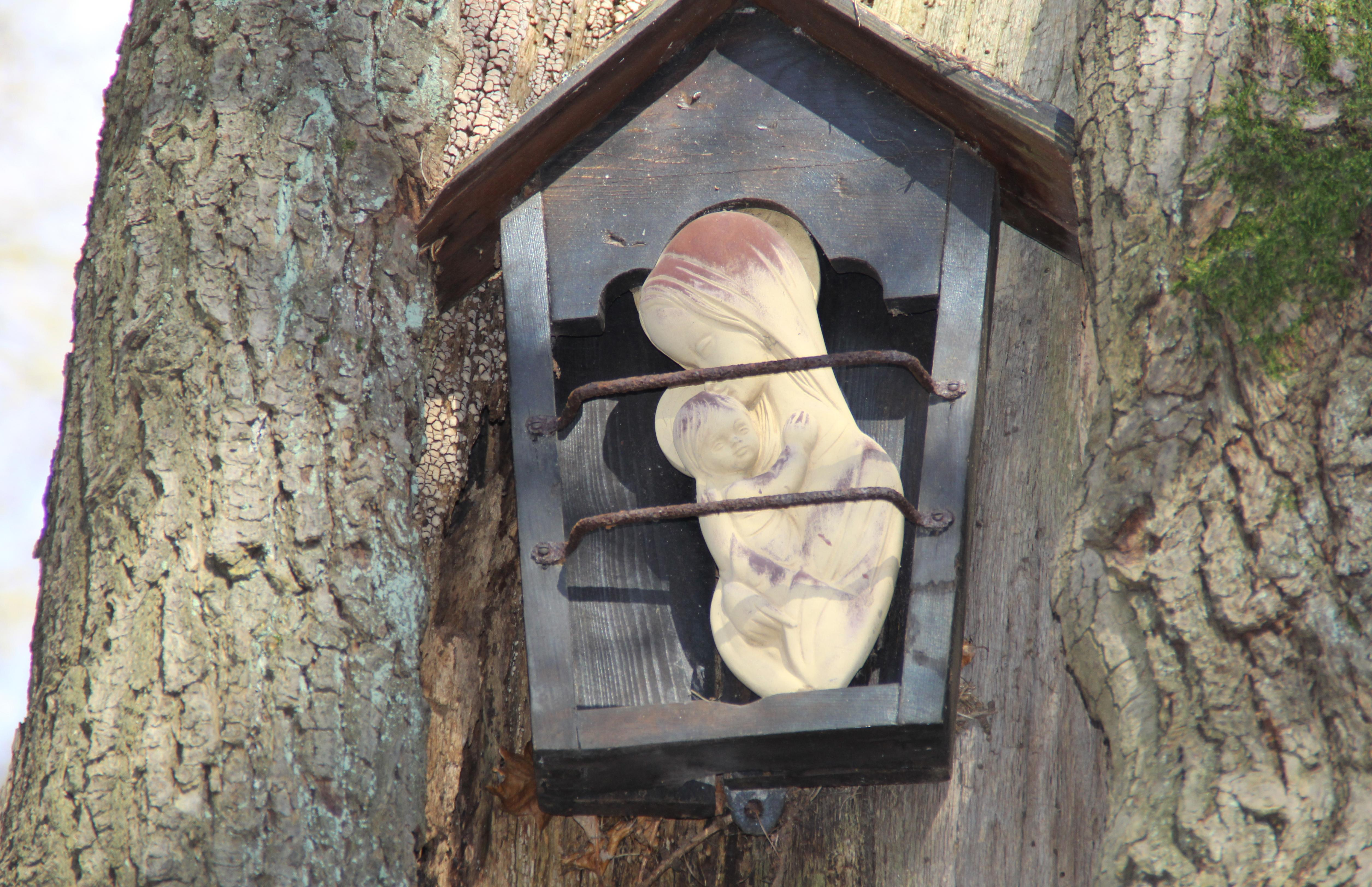 Das Muttergottesbild an der Bildeiche, am Gipfelweg des Hahnenkamms im Spessart bei Alzenau, Bayern